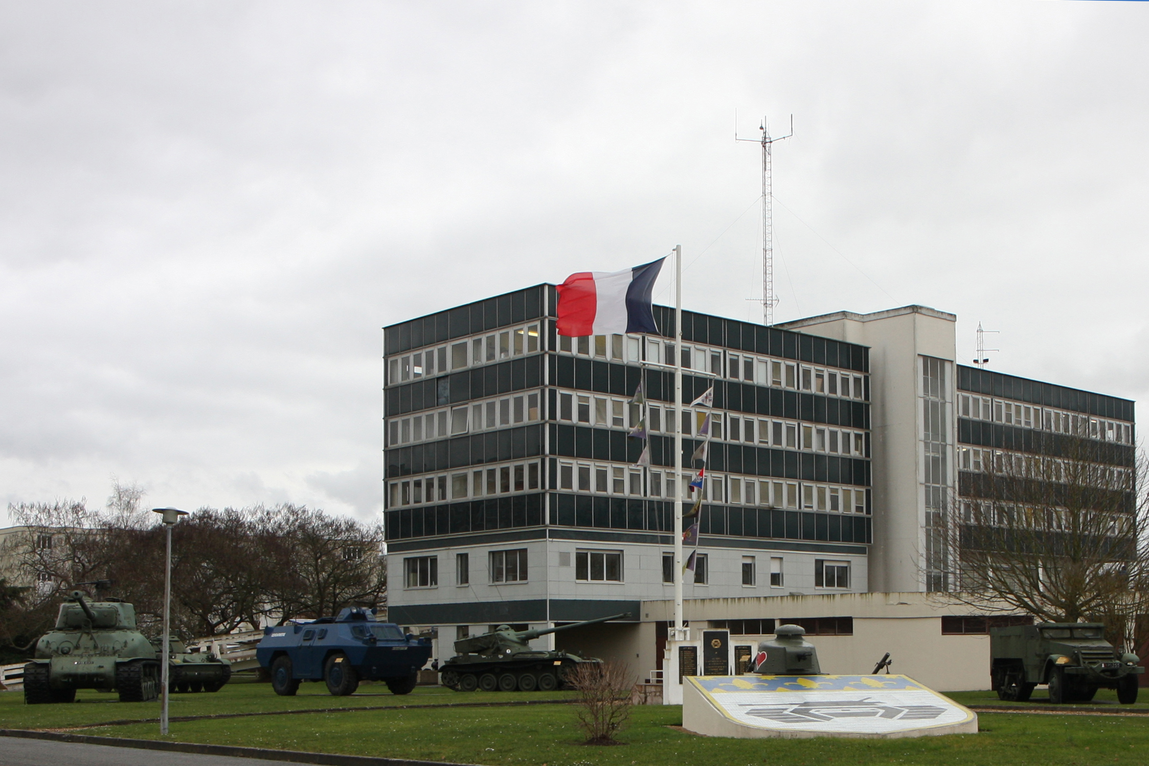 Blindés anciens et modernes de la gendarmerie mobile